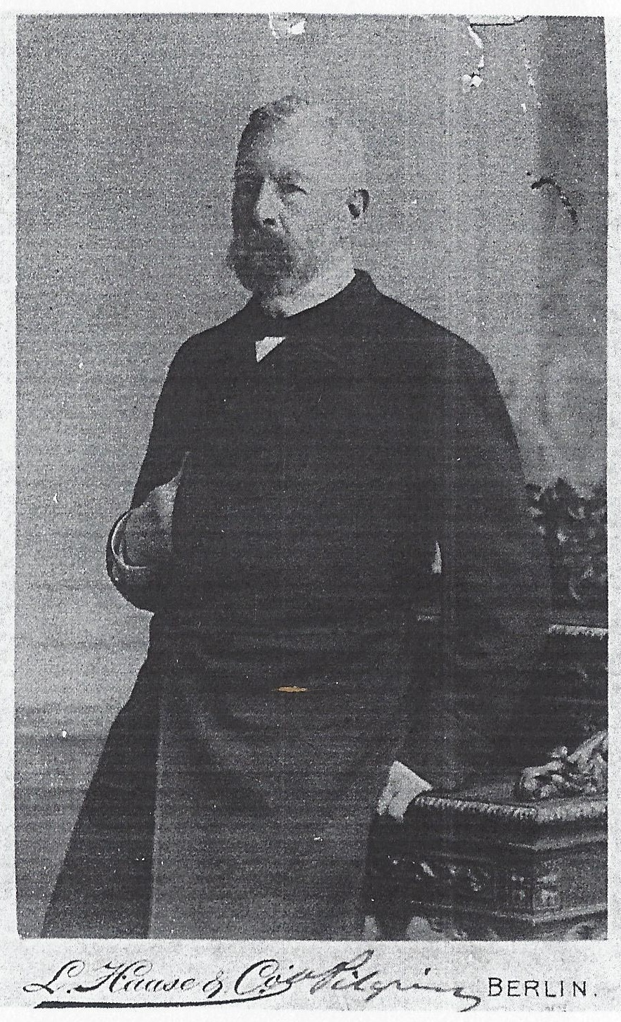 Fotografie von Adolf von Pilgrim (1821-1909)